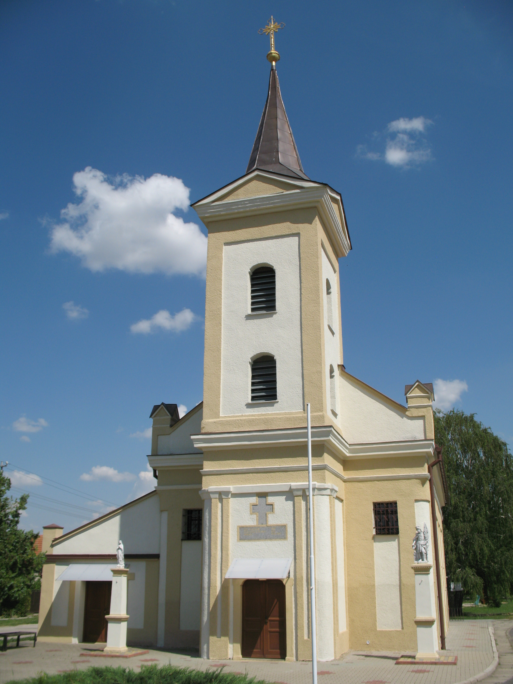 Gyarak